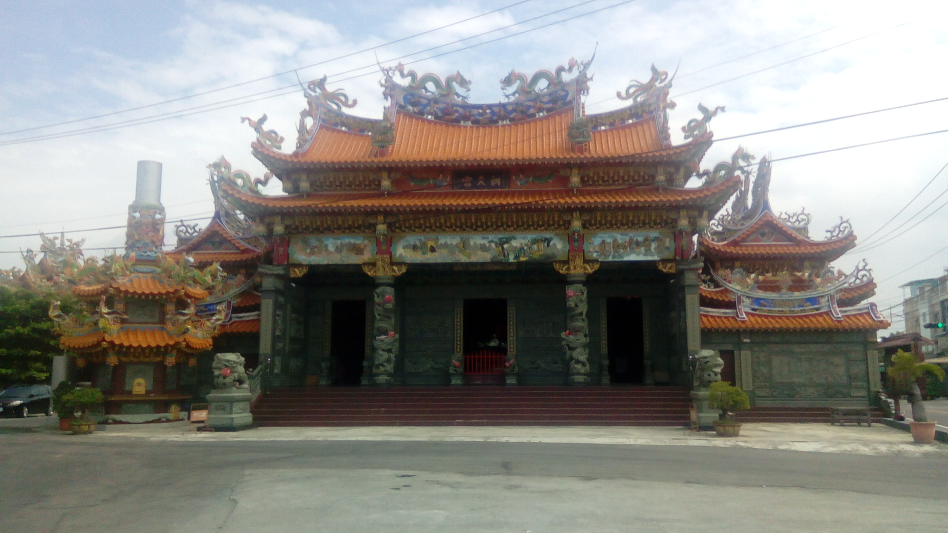 梓官朝天宮 位於高雄市梓官區蚵仔寮魚市場一帶